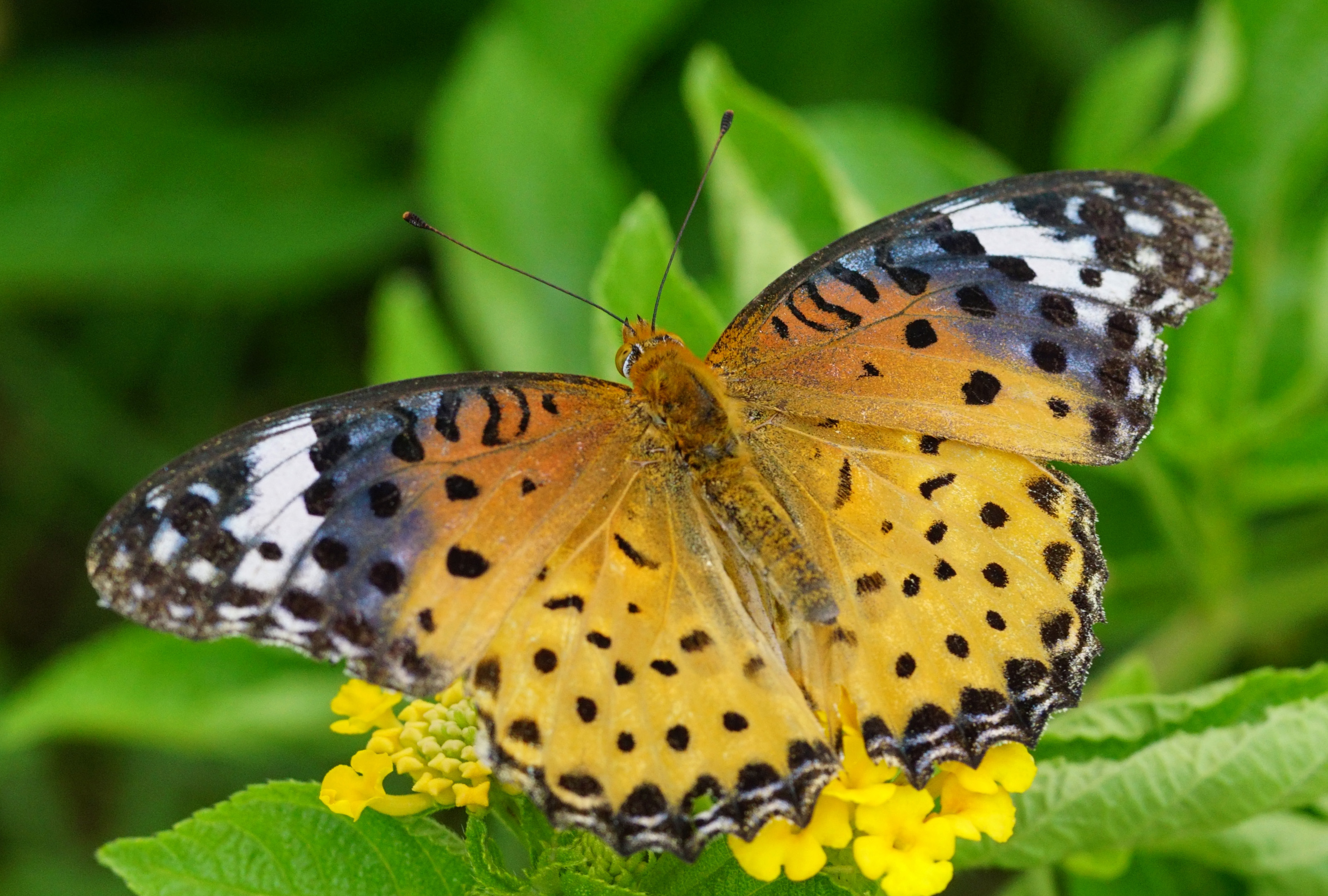 中文（台灣）: 斐豹蛺蝶 Argynnis hyperbius